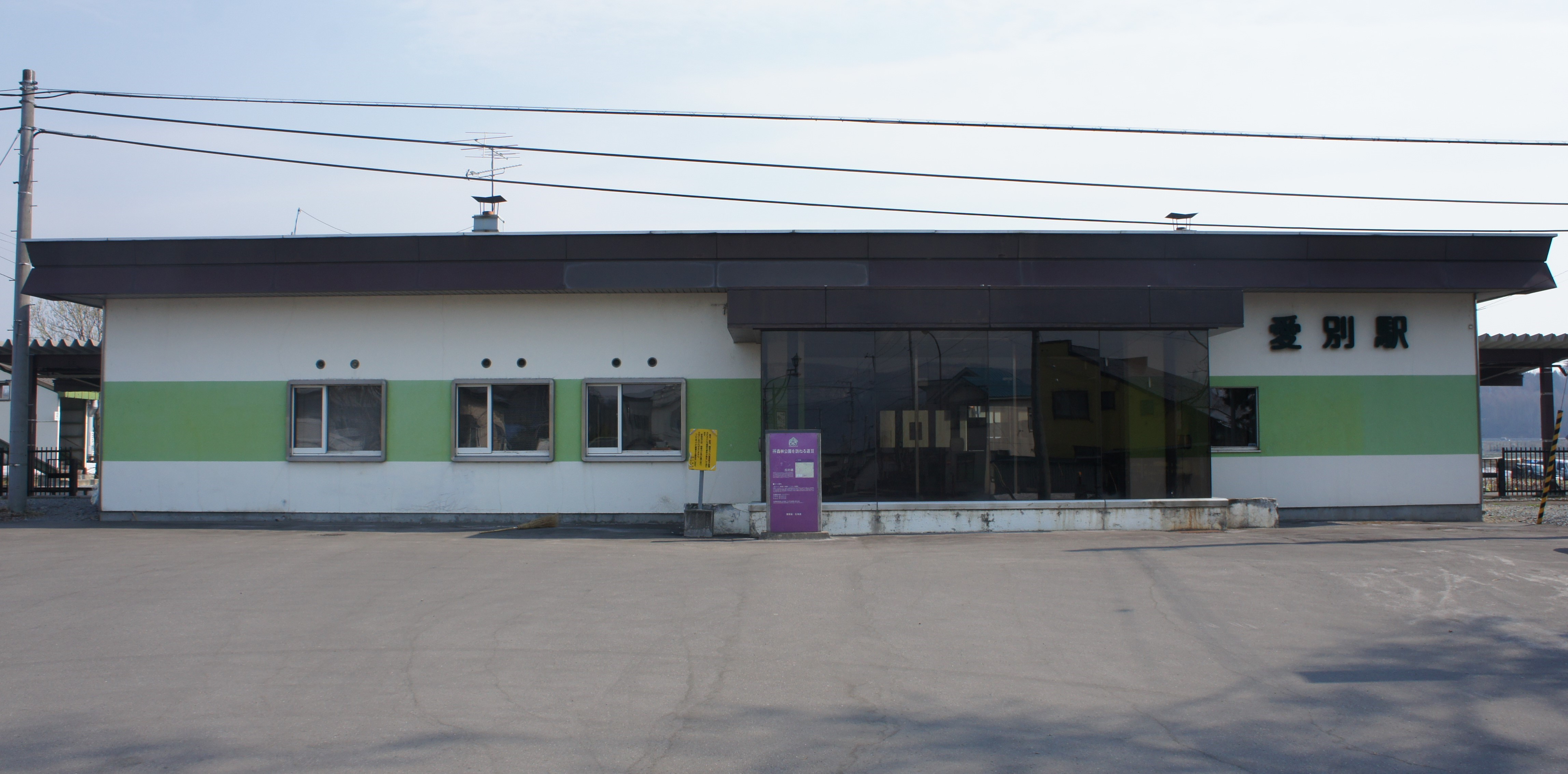 JR石北本線・愛別駅の駅舎